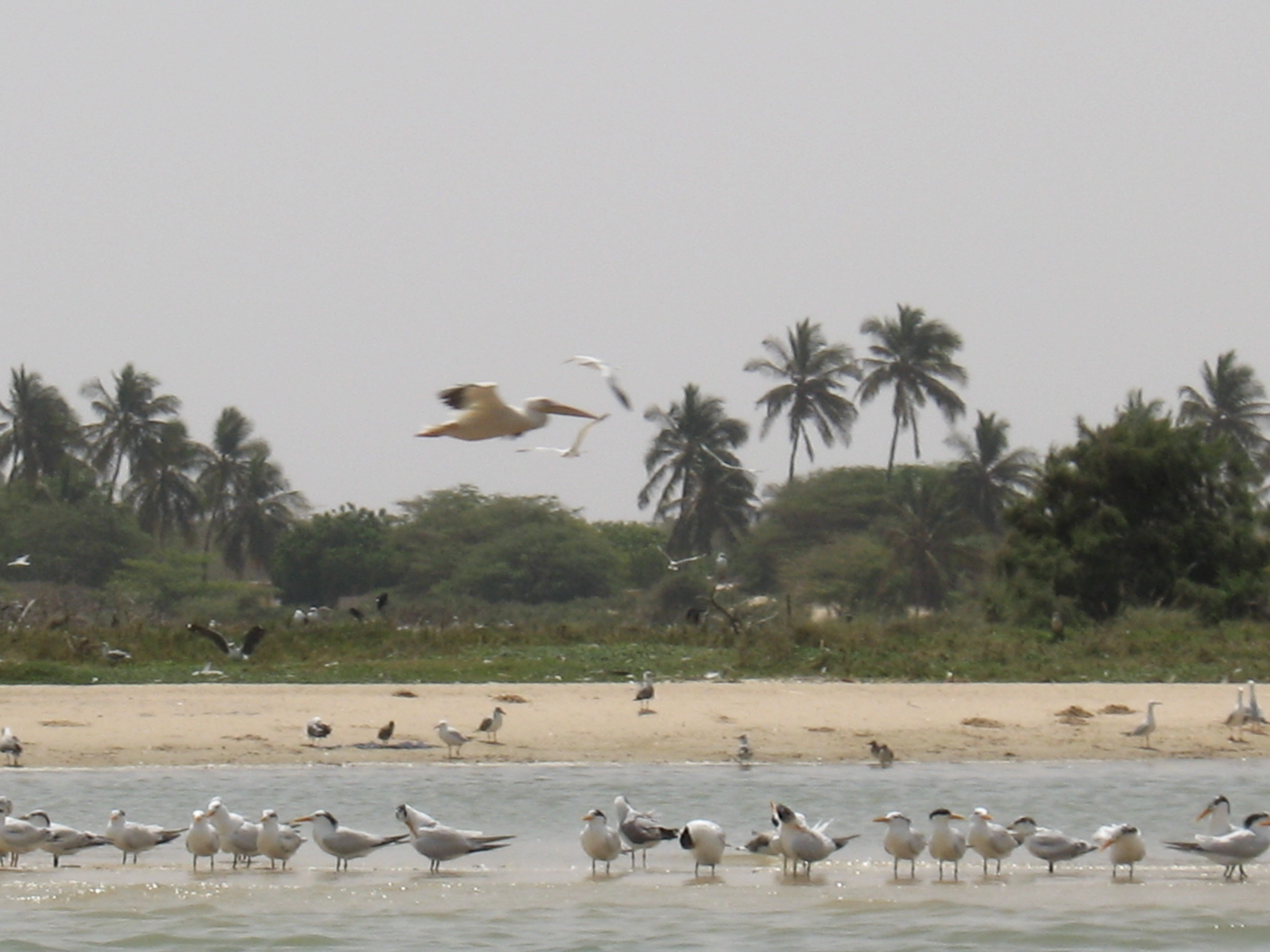 Parc National de la Langue de Barbarie 25 km from Saint-Louis, Senegal, 2006